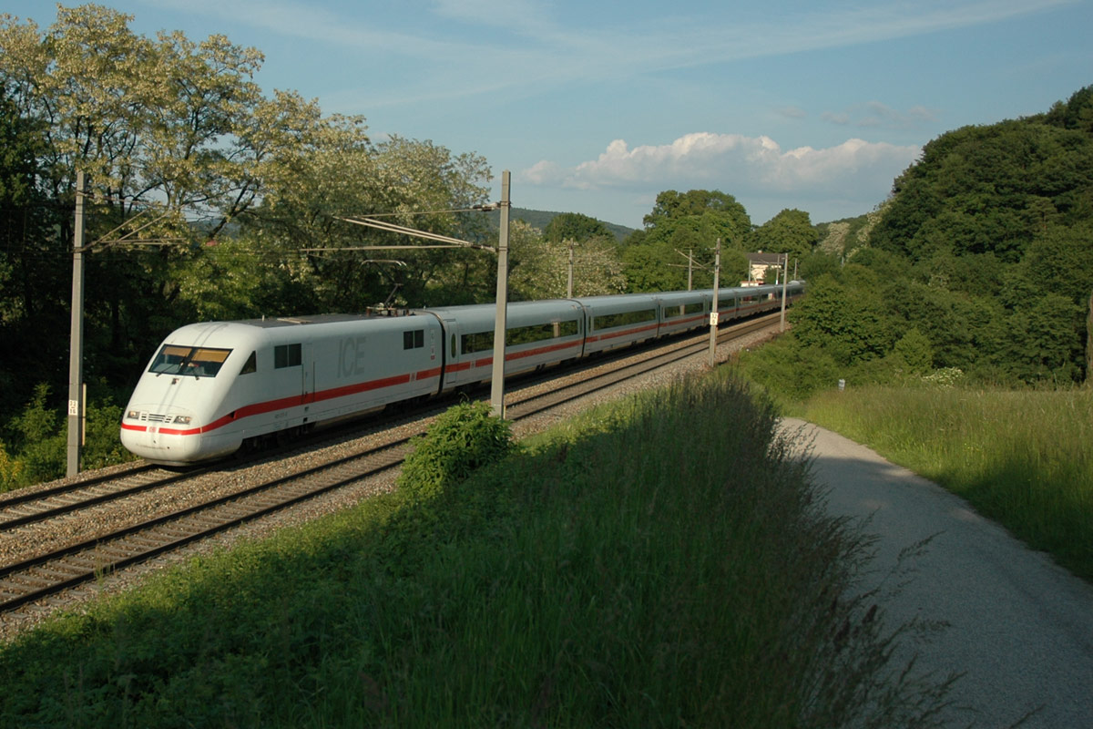 401.070 am 11. Juni 2006 bei Unter Oberndorf (Österr. Westbahn)